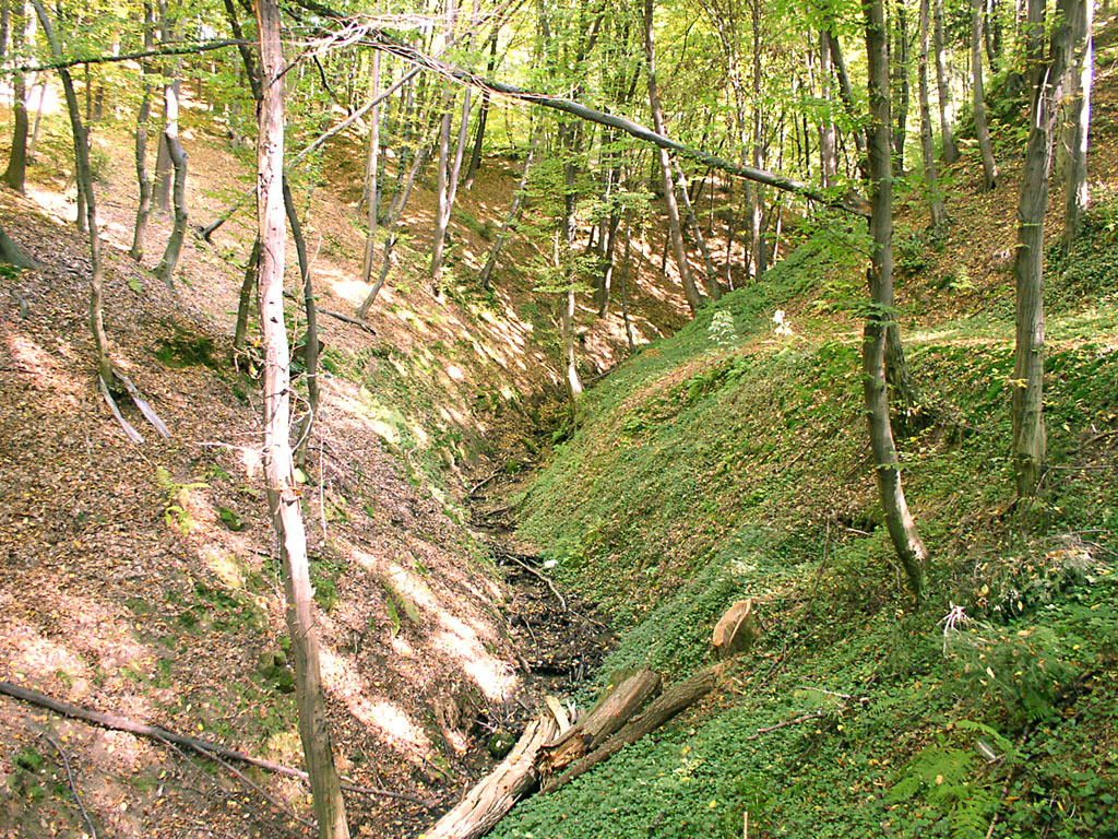 Author: PrzemekL A little canion in Nowy Sacz, Poland.